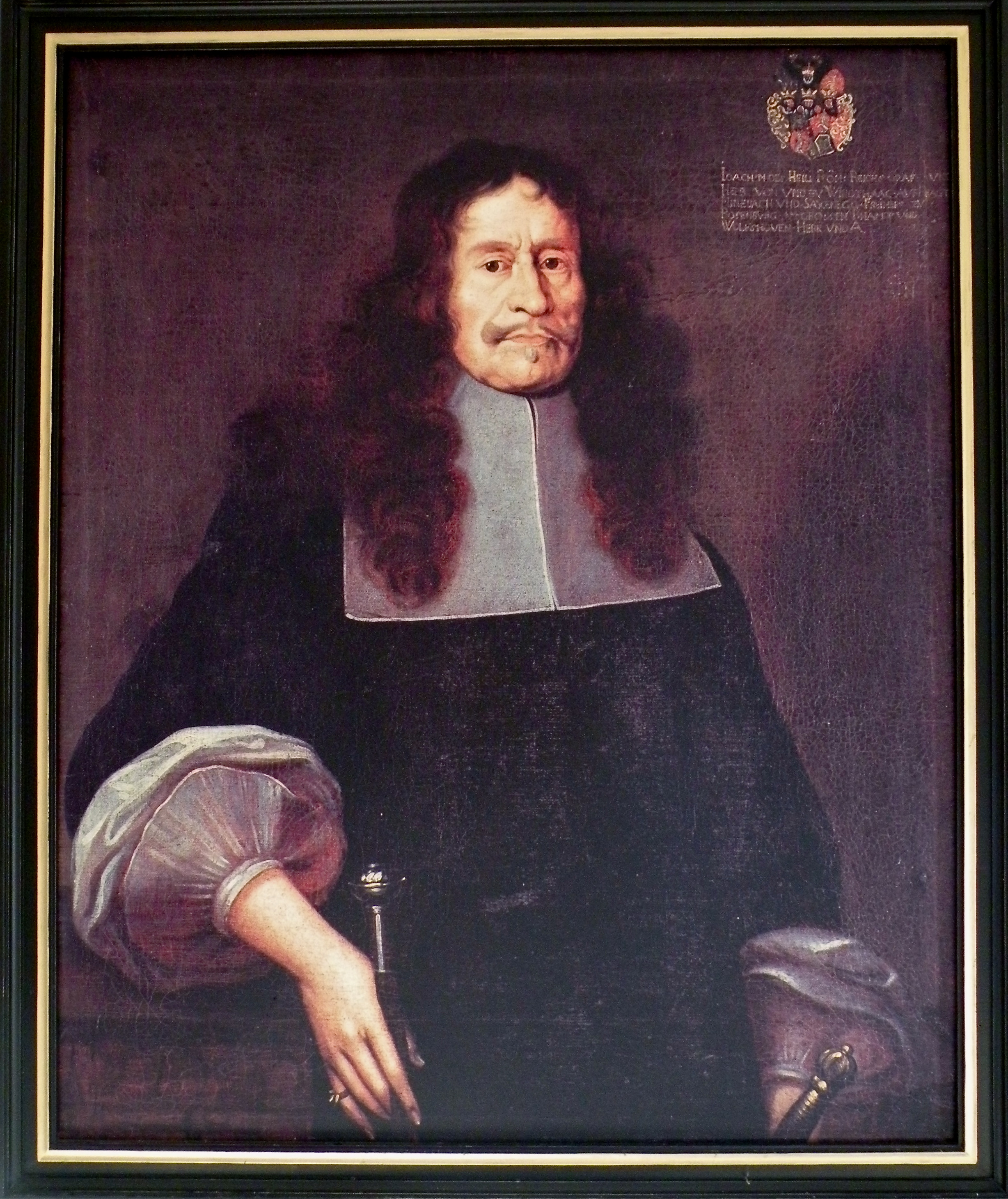 Joachim Enzmilner, Person der Gegenreformation, 17. Jahrhundert, Münzbach, Windhaag bei Perg, Bezirk Perg, Oberösterreich